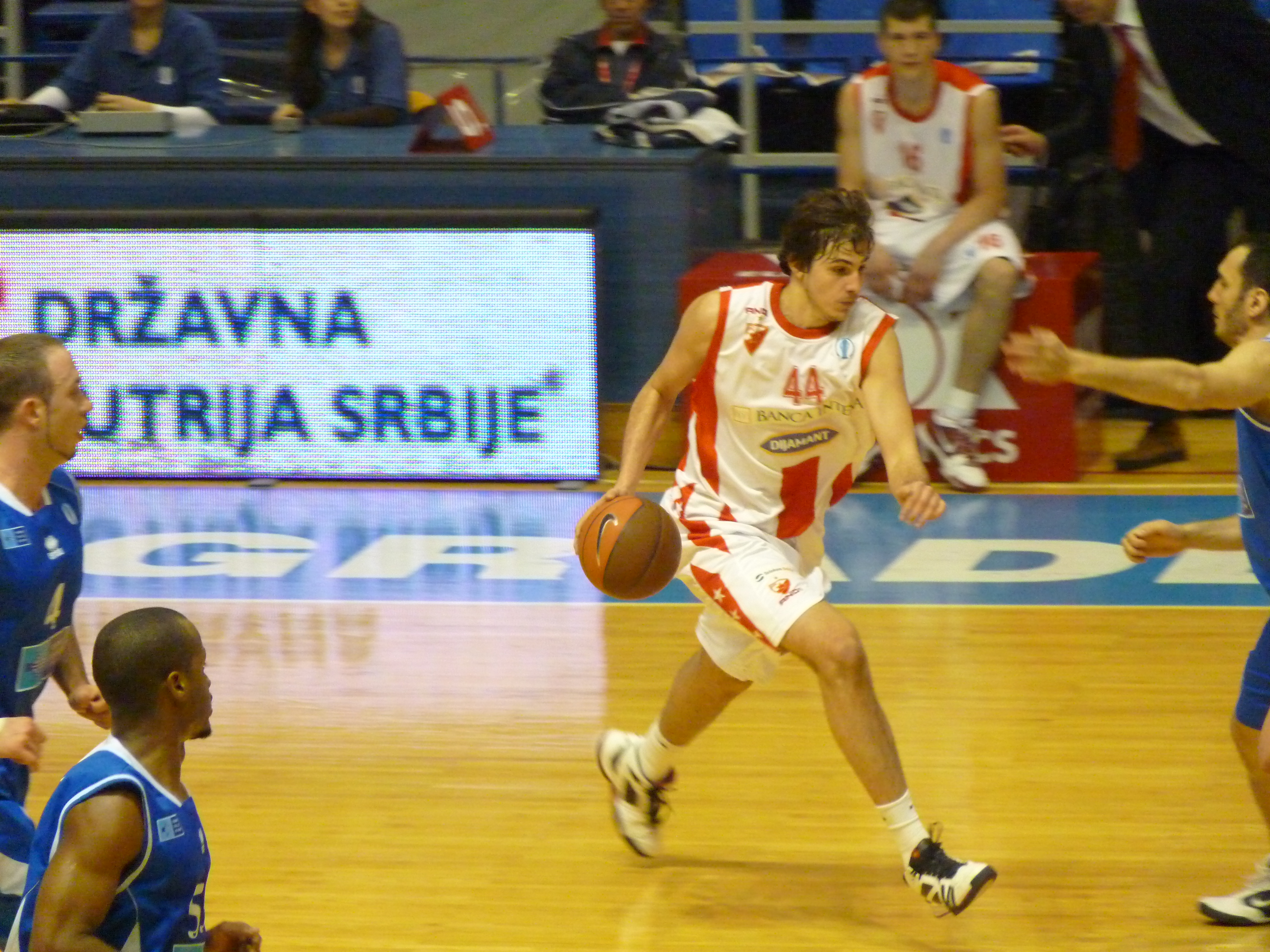 == Лиценца: ==